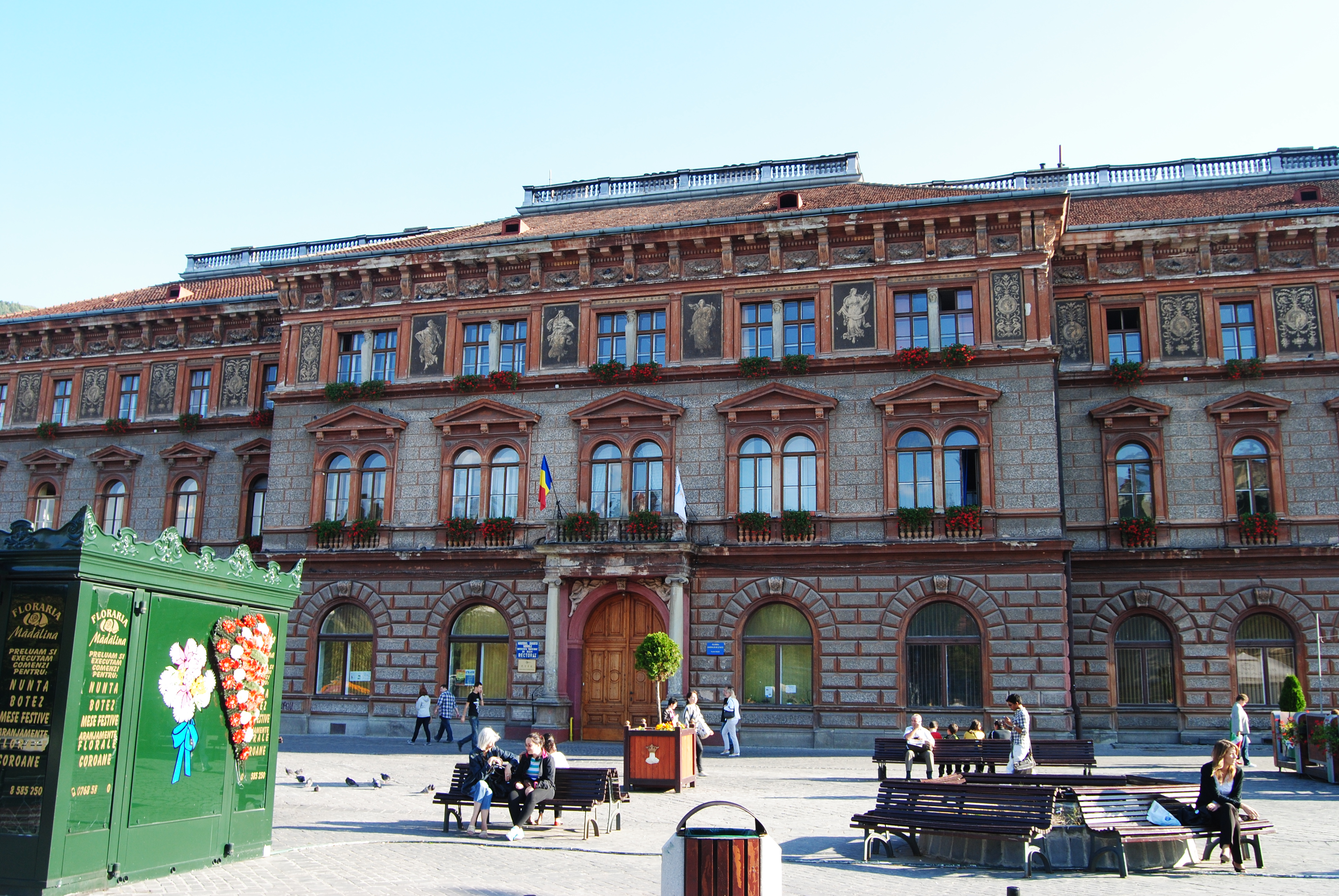 Fosta Prefectură, azi Rectoratul Universității Transilvania din Brașov